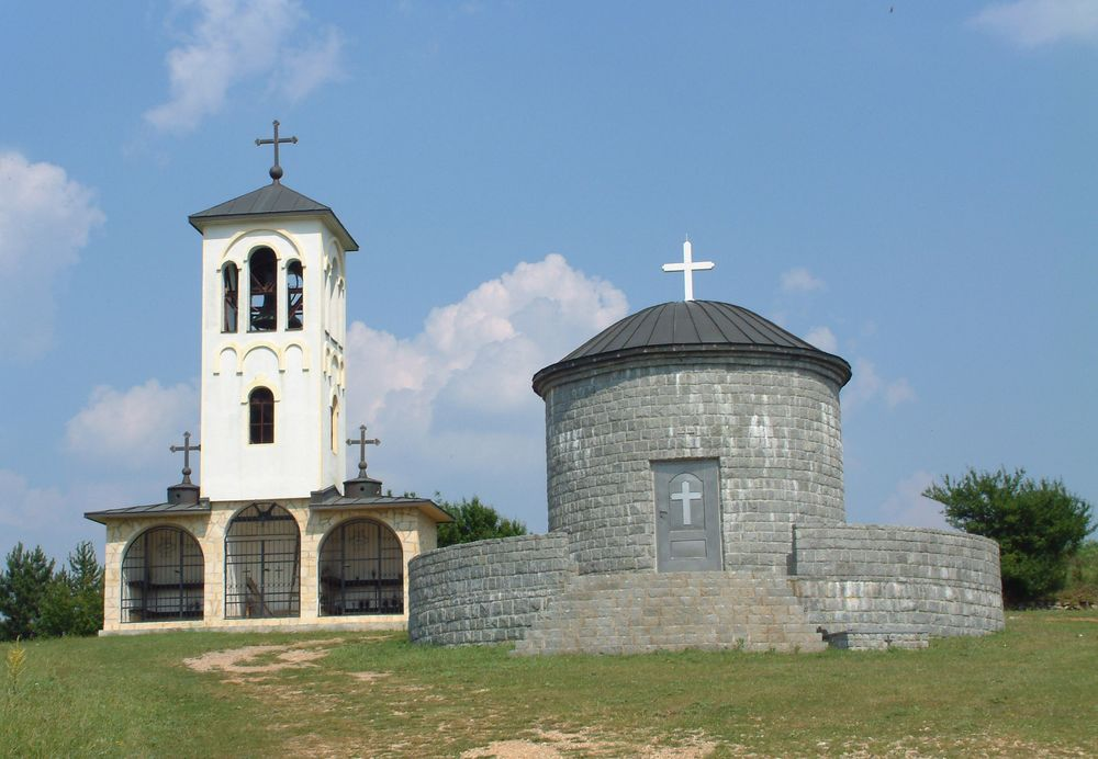 Hram Svete Petke Trnove na tvrđavi Đurđev grad